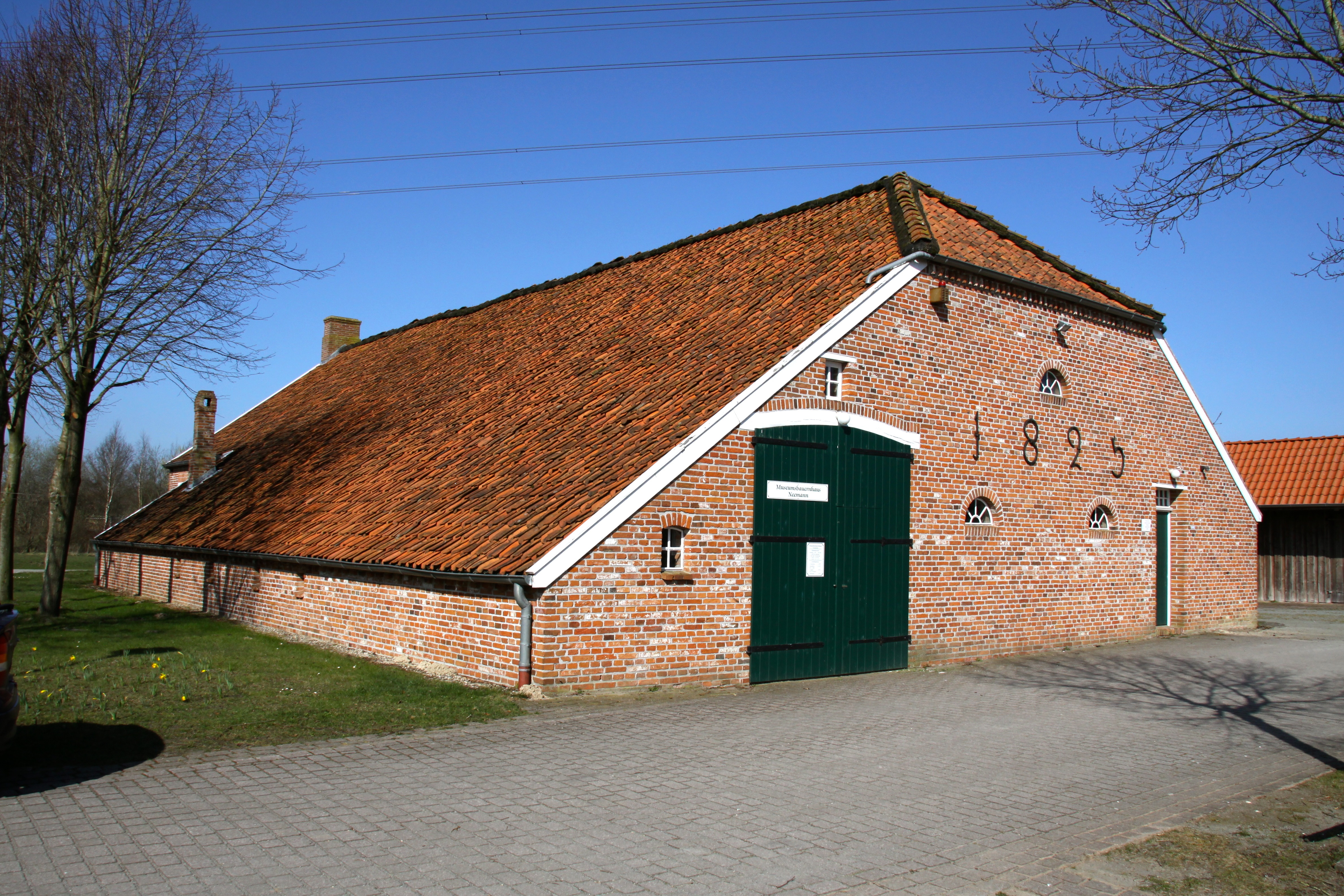 Dorfplatz Grootegaste